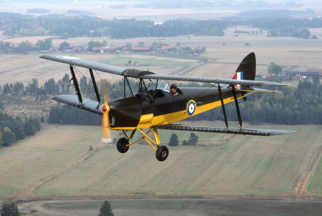 de Havilland DH 82A Tiger Moth, N81DH